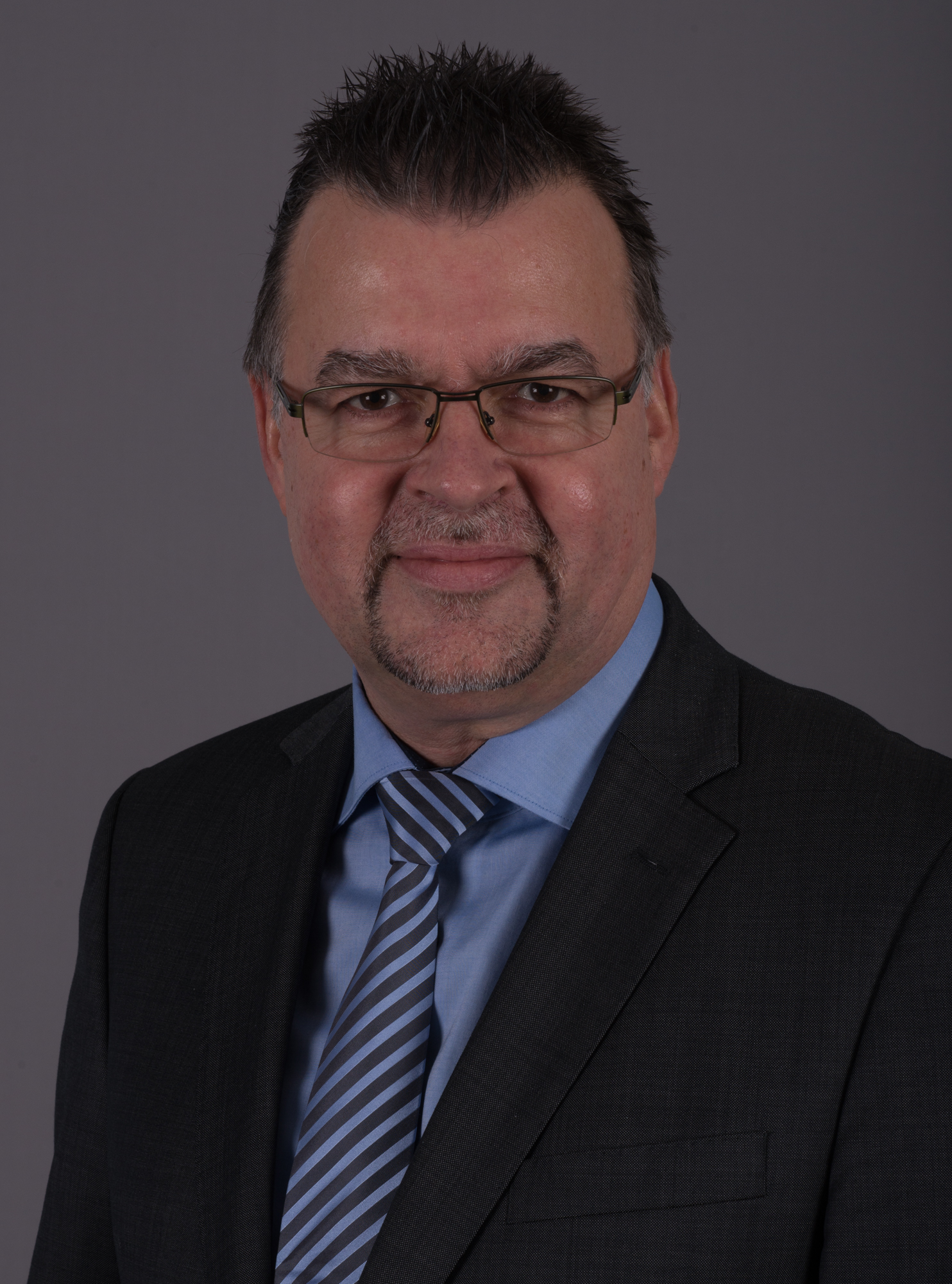 Landtagsprojekt im Thüringer Landtag